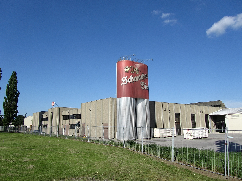 Brauerei Schwechat 2010